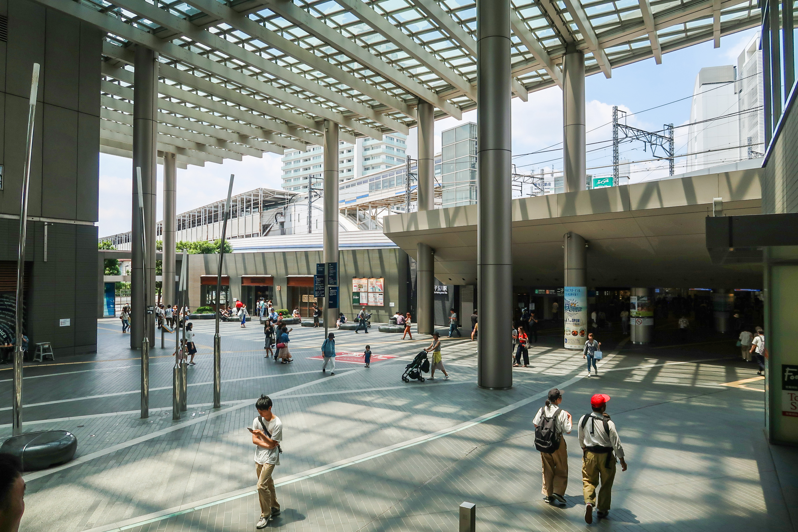 Futako-Tamagawa Station